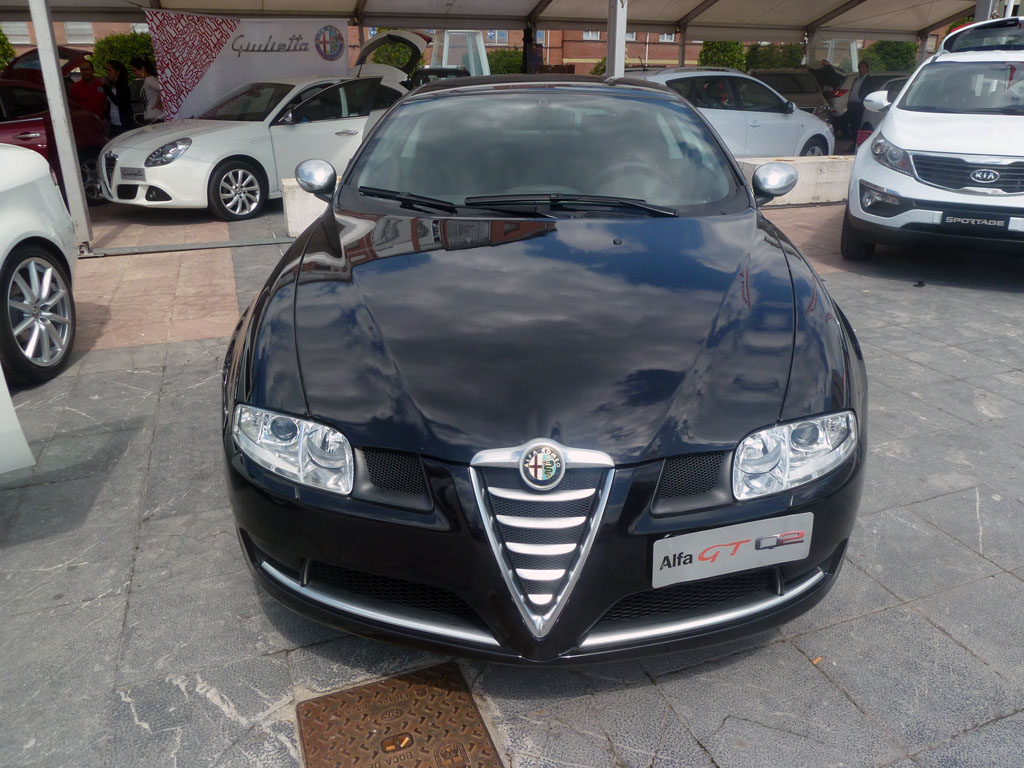 Autos